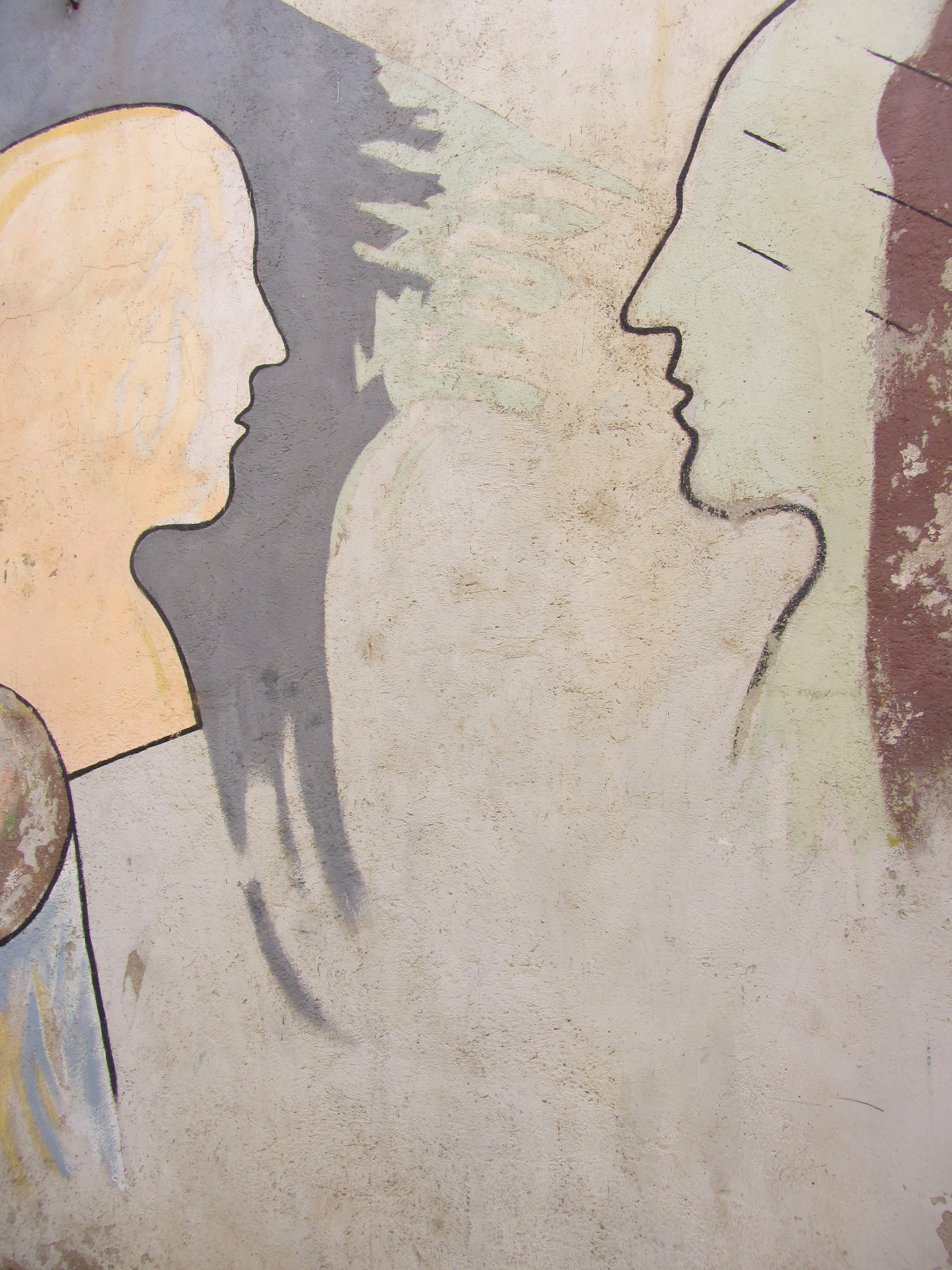 Mural nº8 del Museo a Cielo Abierto de Valparaíso, titulado Siluetas en contraluz (detalle), de Ricardo Yrarrázaval